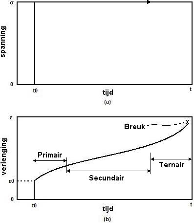 Beschrijving van de kruipcurve van een materiaal wat met een constante spanning belast wordt. Nadat de kruip drie verschillende fasen is doorgegaan, breekt het materiaal uiteindelijk.